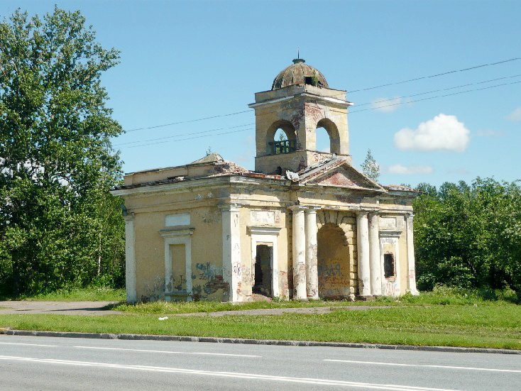 Памятник архитектуры. Построены в 1803-1805 гг. архитектором Ф. И. Демерцовым к визиту Александра I, посетившего пороховой завод в 1806 г. (современное расположение - напротив дома №18 по ул.Химиков, на берегу р. Охты)